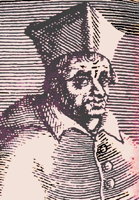 Cardinal Bertrand de Pouget